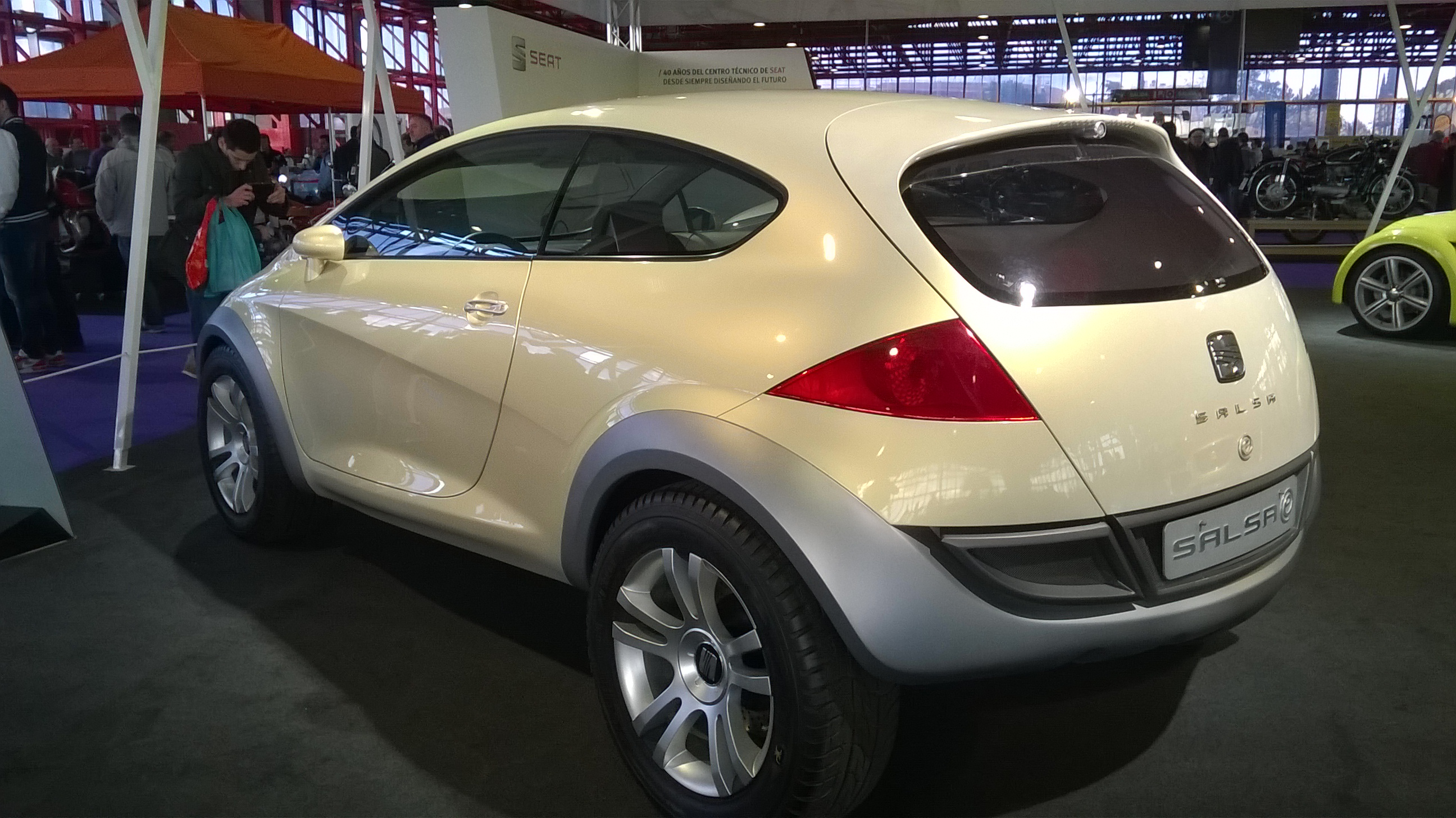 40 aniversario del centro técnico de SEAT en ClassicAuto, Salón Internacional del Vehículo Clásico de Madrid 2015.